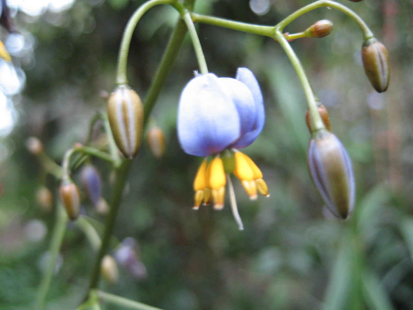 Dianella tasmanica - Blüte - Bot. Garten Berlin Dahlem